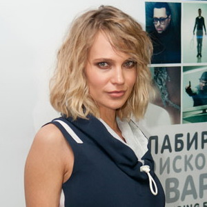 Певица Глюкоза на презентации клипа группы «Дискотека Авария» «Лабиринт». 2012 год.